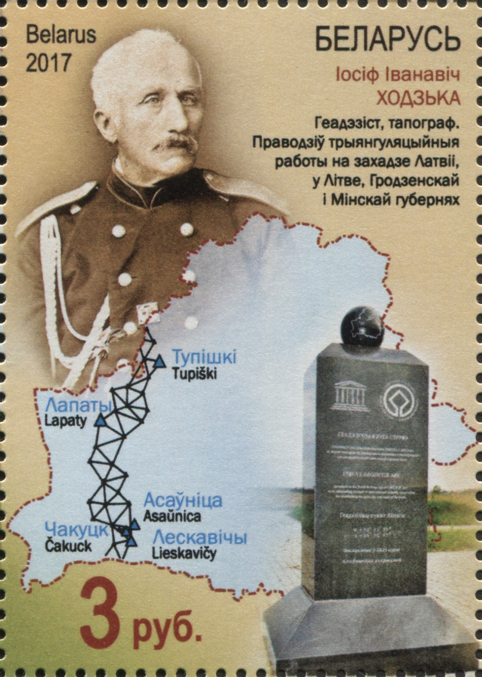 Struve Geodetic Arc